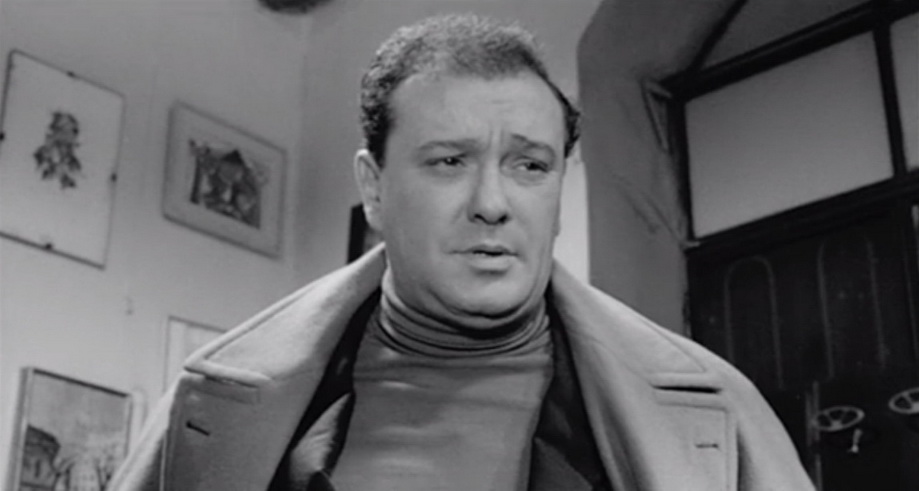 Scena dal film La vita agra